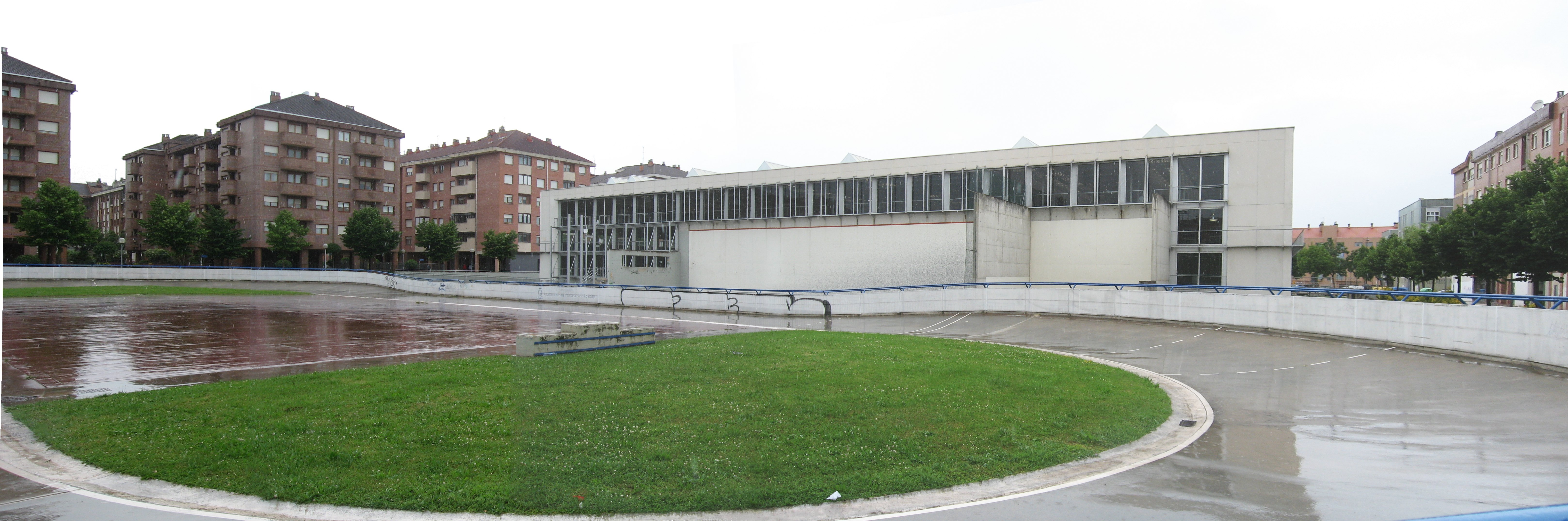 Desc: Centro cívico de Ariznabarra